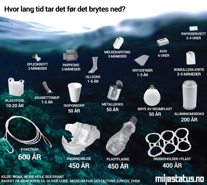 Hvor lang tid tar det før forskjellige produkter brytes ned i havet?